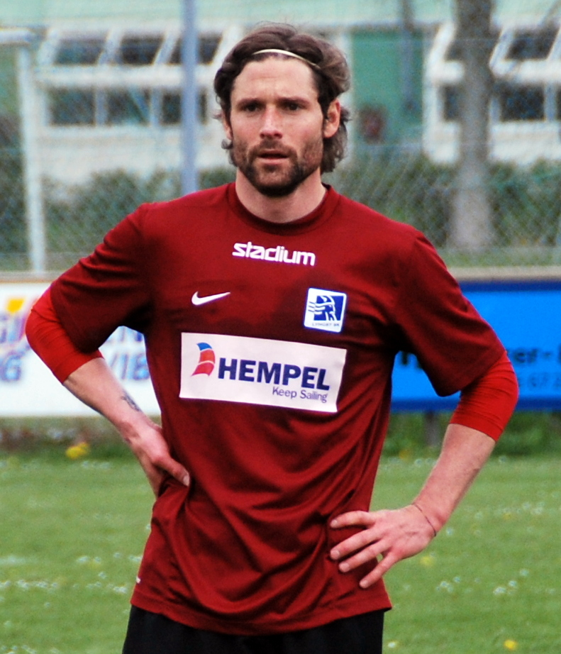 Fodboldspilleren Peter Madsen fra Lyngby Boldklub. Her under en reservekamp mod Viborg FF på Viborgs træningsanlæg på Kirkebækvej.